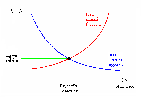 Piaci egyensúly, illusztráció a cikkhez